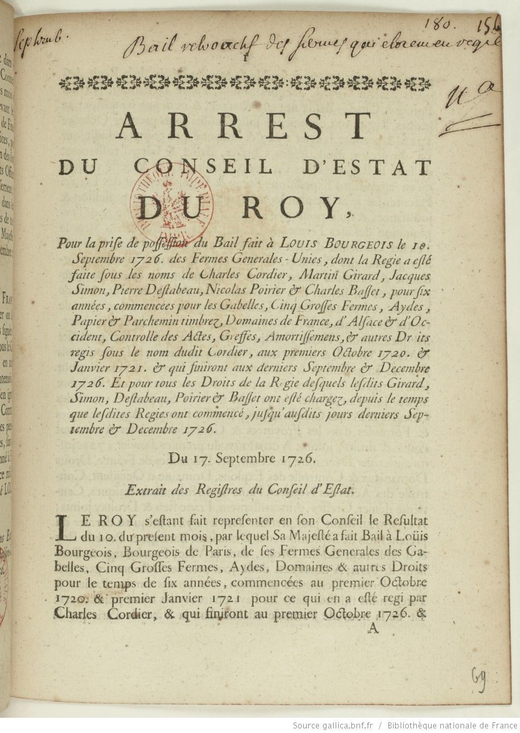 Page de tête de la prise de possessio du Bail des fermes générales consenti à Louis Bourgeois